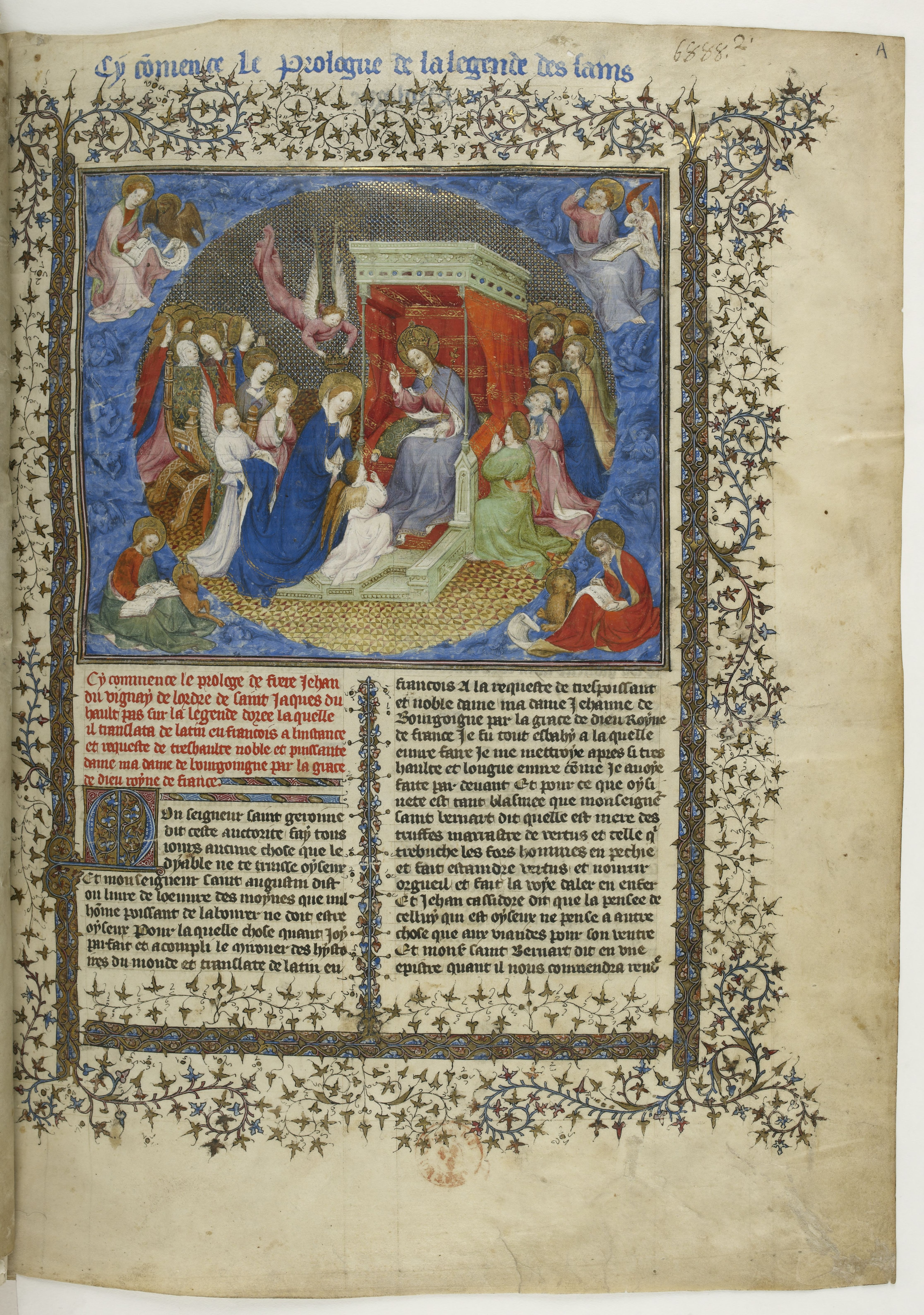 Couronnement de la Vierge, dans Jacques de Voragine , Légende dorée